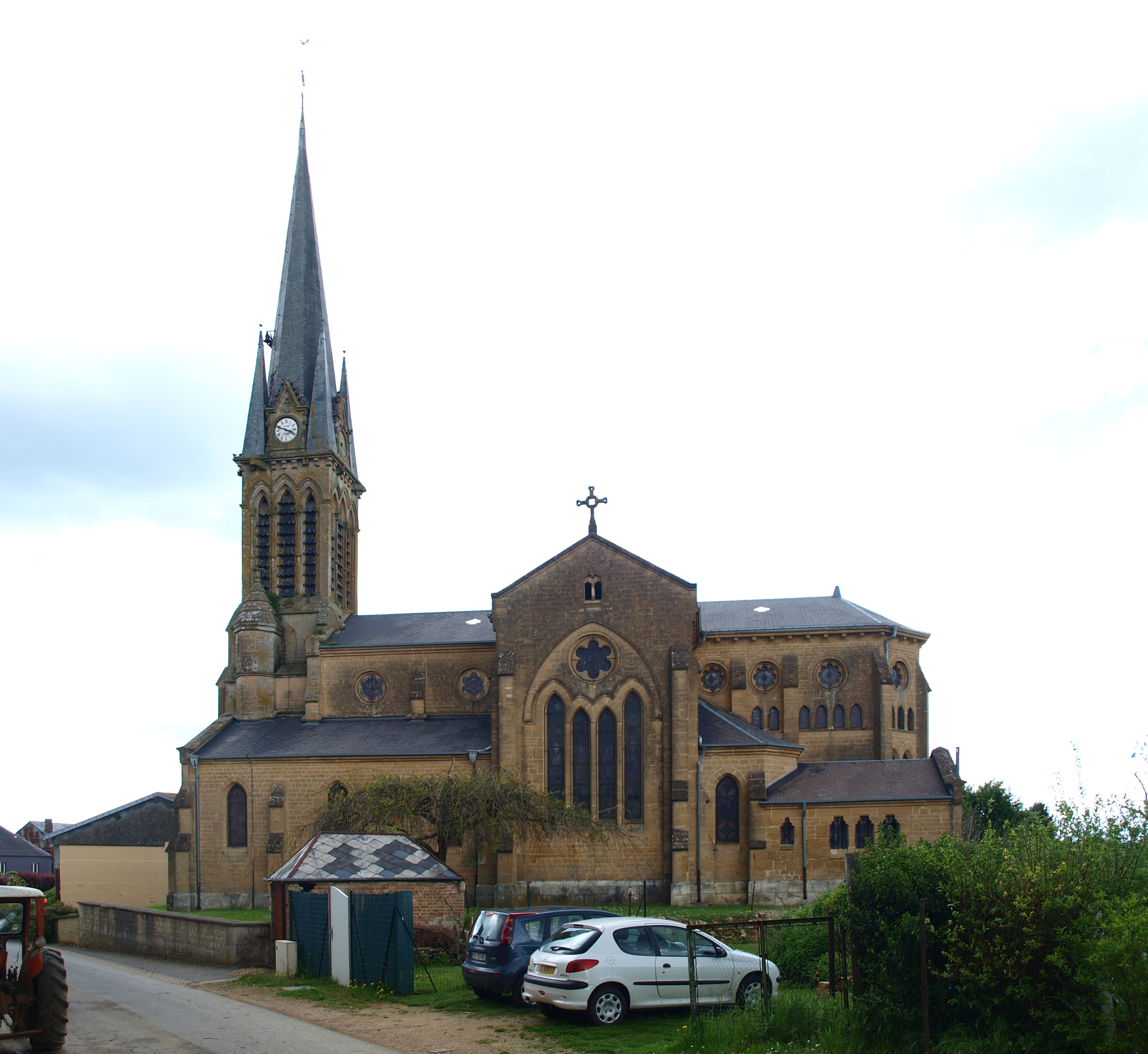 Jonval (Ardennes, France) ; l'église